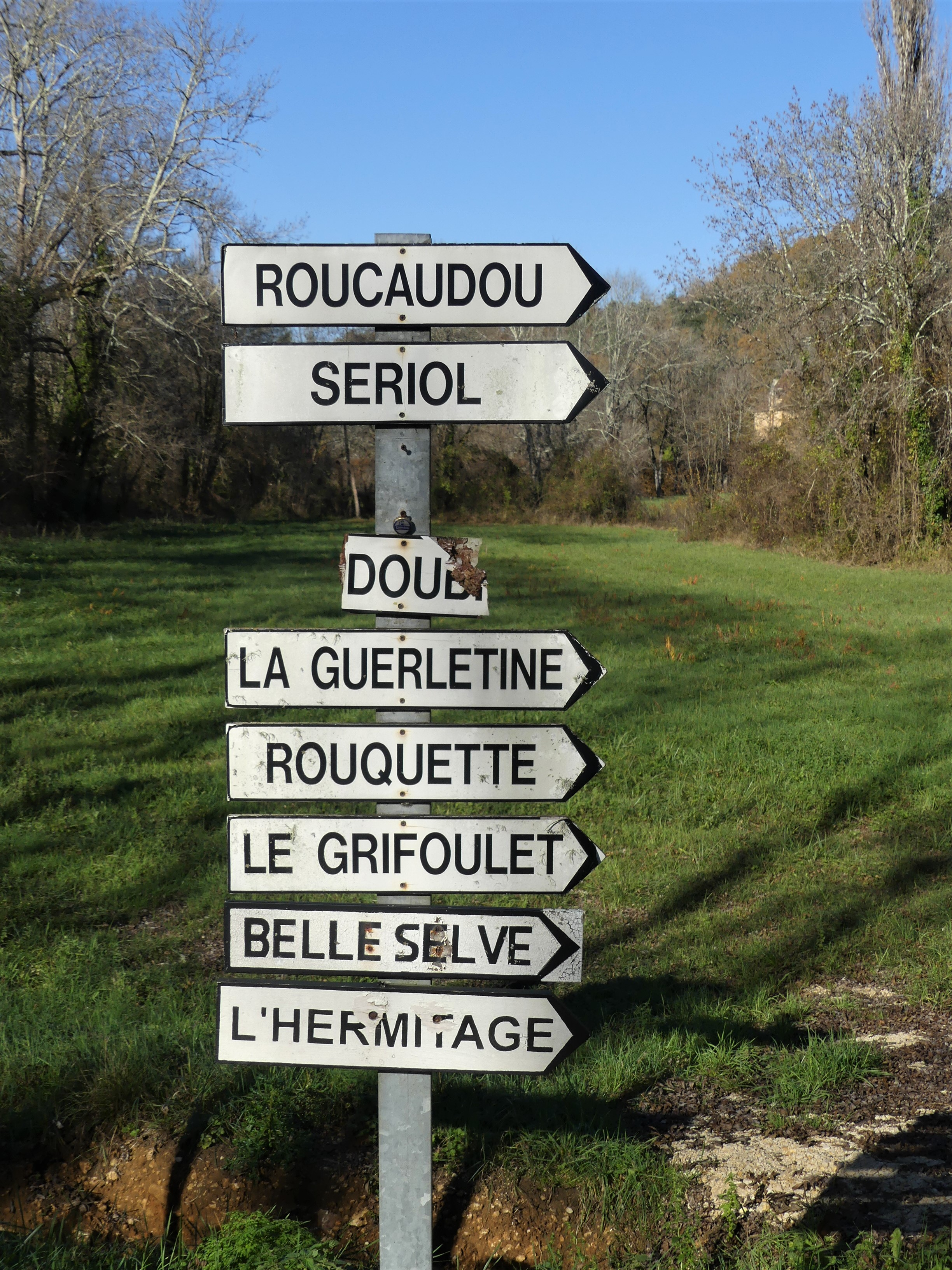 Panneaux de lieux-dits au sud de Roucaudou, Manaurie, Dordogne, France.